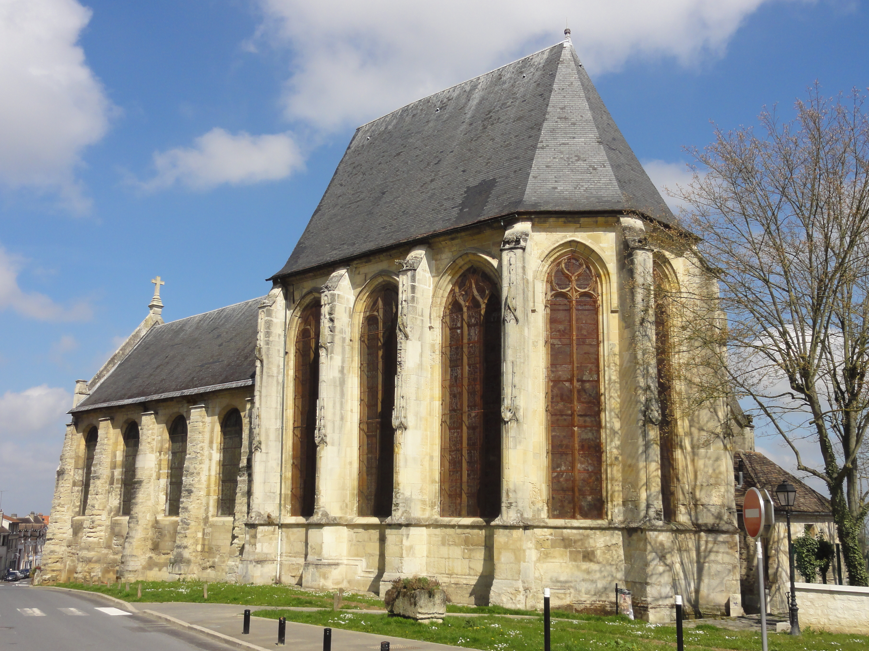 Église Saint-Acceul d'Écouen - voir titre.